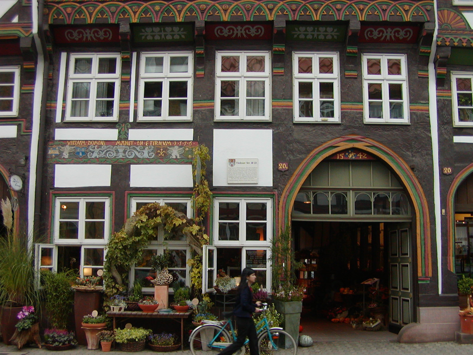 Fachwerkhaus in Einbeck